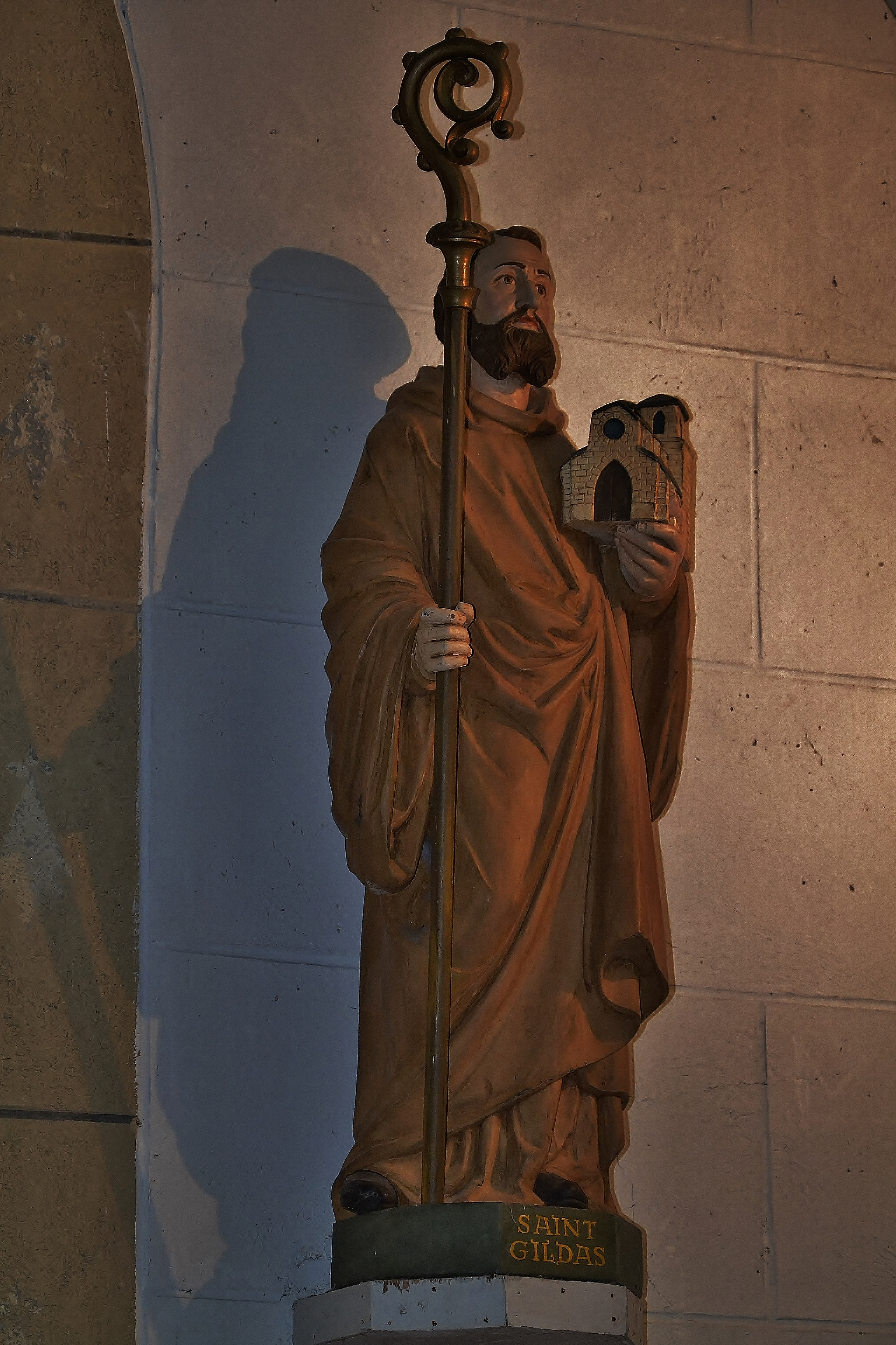 Statue de saint Gildas dans le chevet de la chapelle Saint-Gildas de Bieuzy